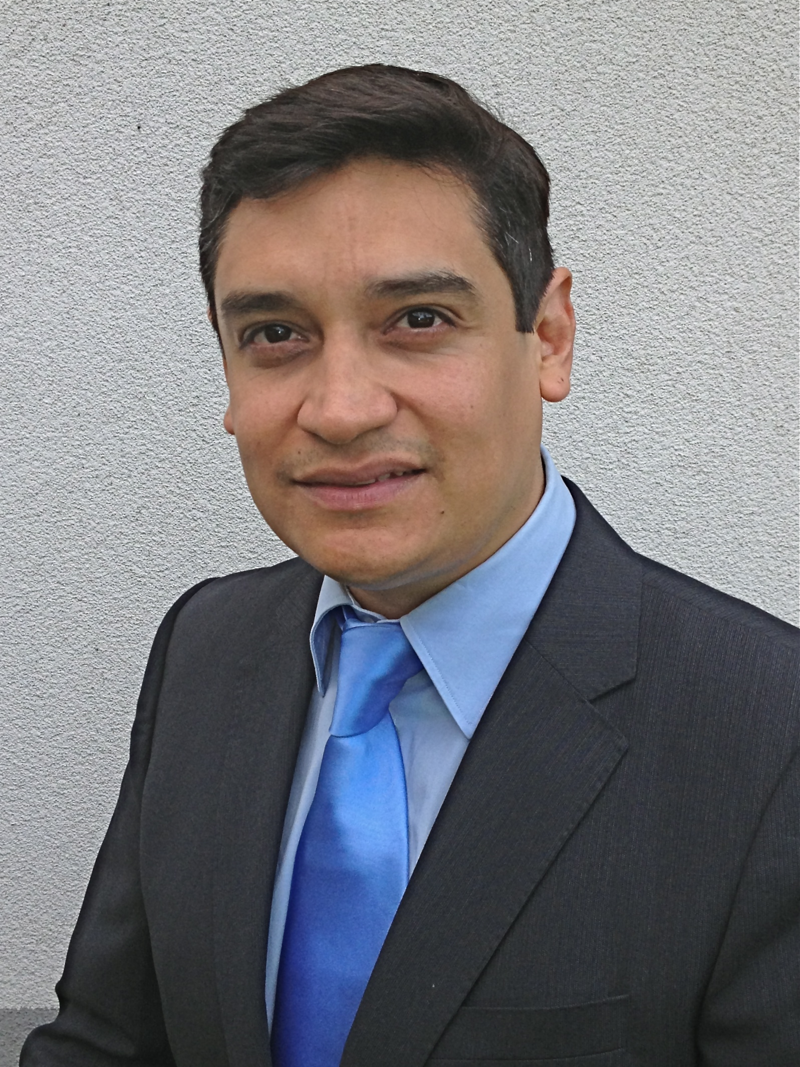 Carlos González Sháněl